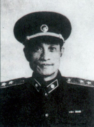 王秉璋将军1955年受勋照